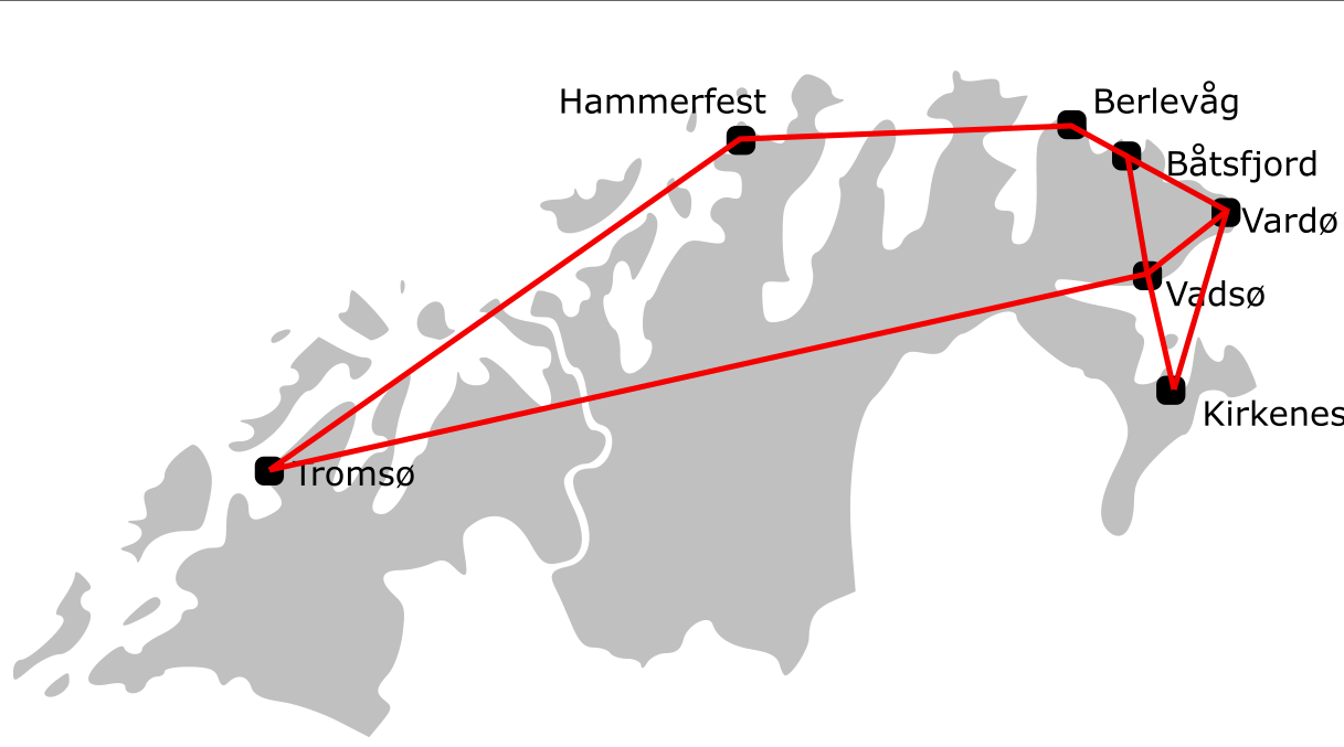 Rutekart fra Vardø lufthavn